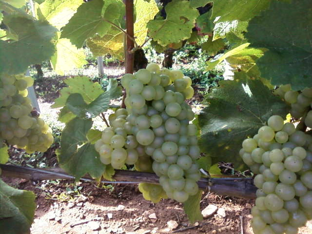 Chardonnaytrauben in Givry